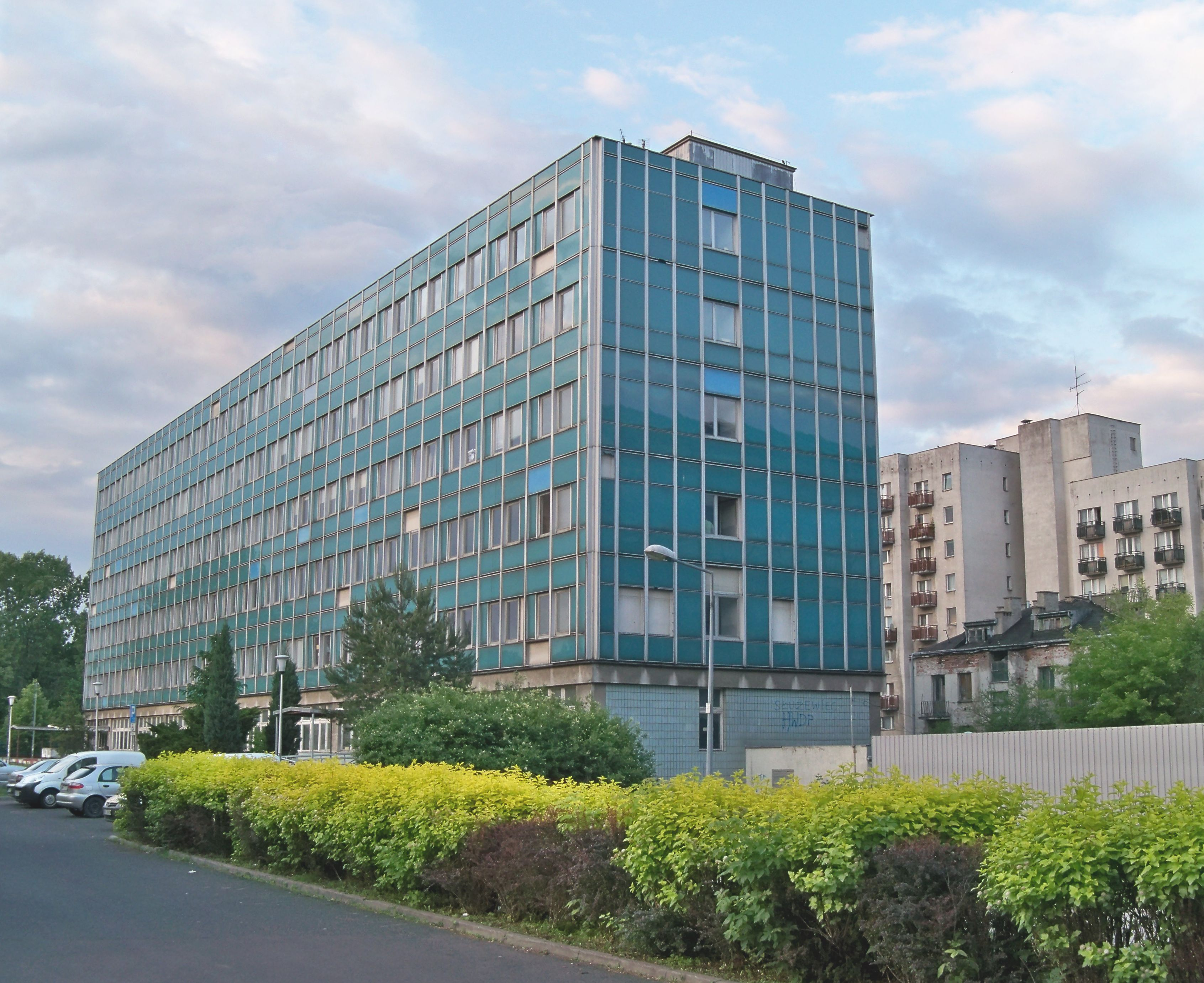 Budynek Wydziału Lingwistyki Stosowanej Uniwersytetu Warszawskiego, ulica Szturmowa 4 w Warszawie